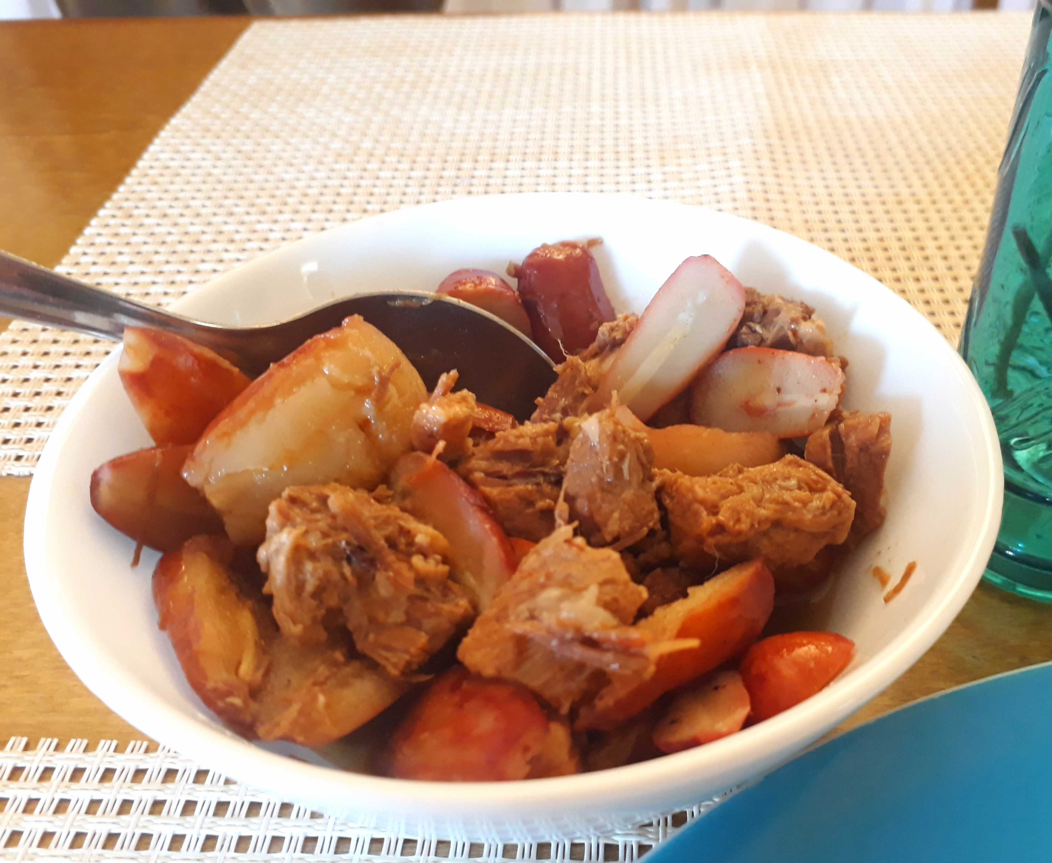 Entrevero de pinhão, prato típico de Telêmaco Borba, região dos Campos Gerais do Paraná.